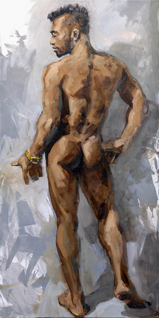 Robert C. Rore WV8542 "Stehender junger Mann", Oel auf Leinwand, 100x50cm, 2016